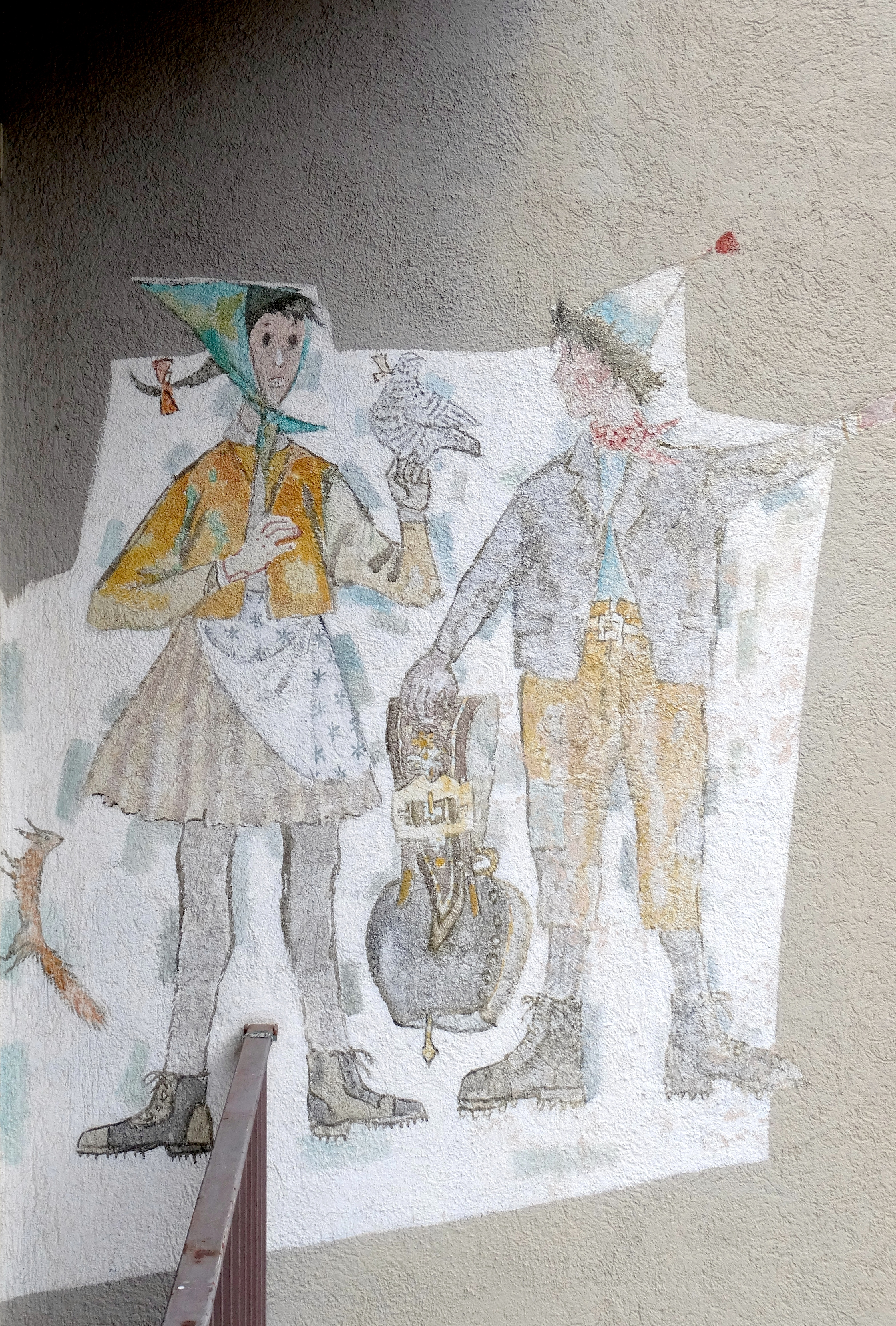 Zeichnung von Alois Carigiet an einem Haus in Davos-Laret; Flurina und Schellenursli